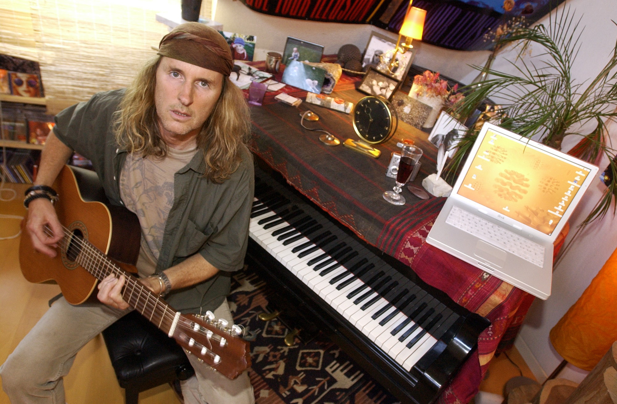 Chris von Rohr of Krokus